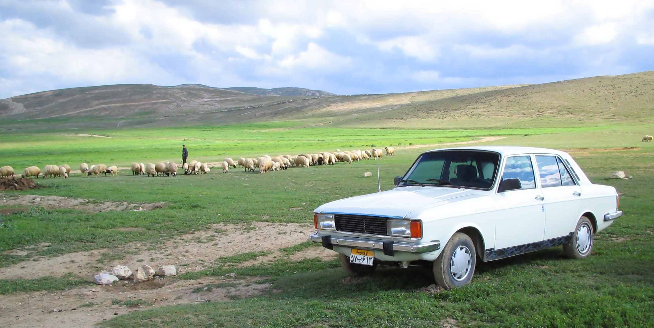 A Paykan near Chaldoran.